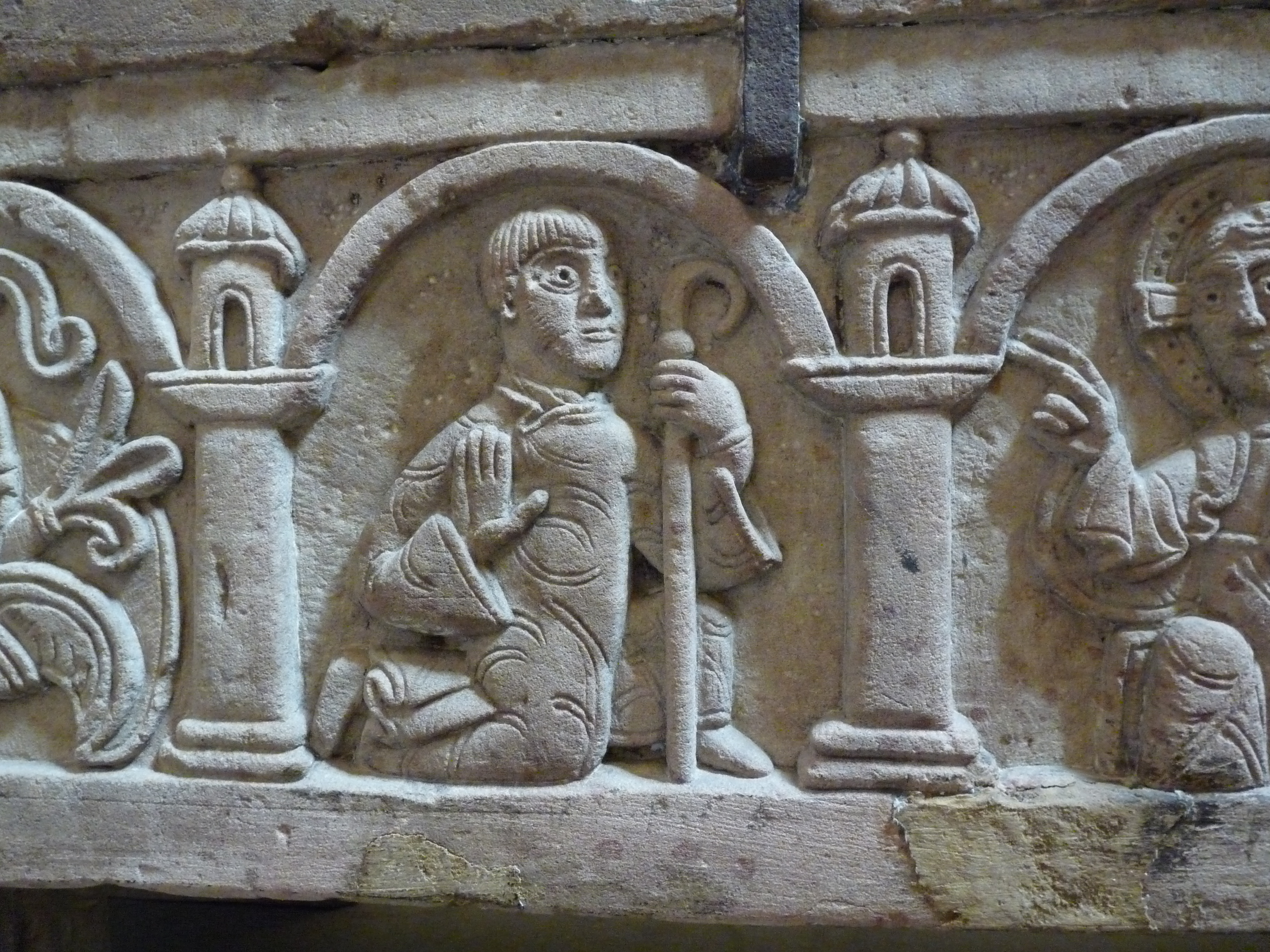 Sarcophage d'Adeloch (détail) à l'église Saint-Thomas de Strasbourg (12e siècle)